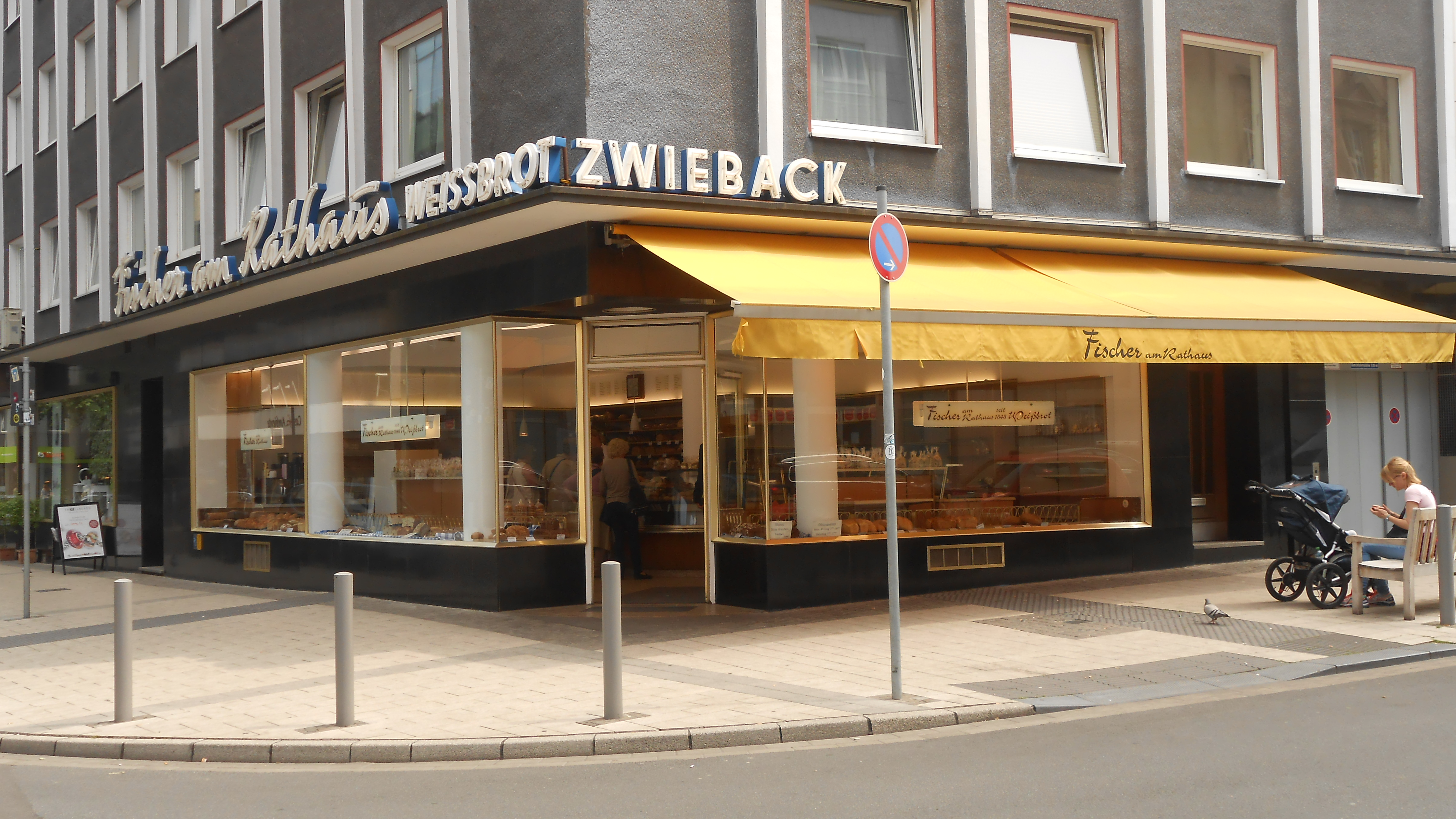 Die traditionsreiche Bäckerei Fischer am Rathaus in der Dortmunder Innenstadt gilt als Geburtsstätte des Dortmunder Salzkuchens, eine runde Kümmel-Salz-Brötchen-Spezialität mit einem Loch in der Mitte, häufig für Mettbrötchen verwendet.